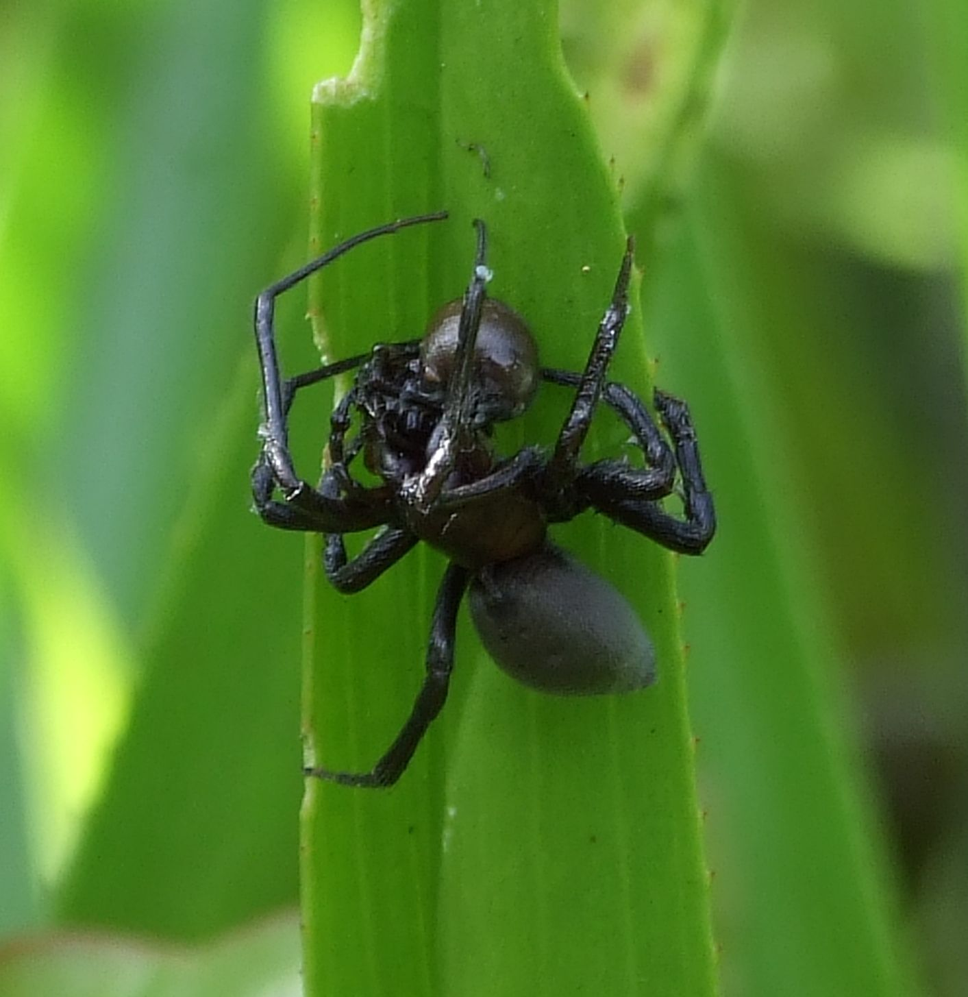 Wenn die Beute (hier ein Artgenosse) der Wasserspinne zu groß ist, verlässt sie das Wasser und verspeist diese an der Luft.